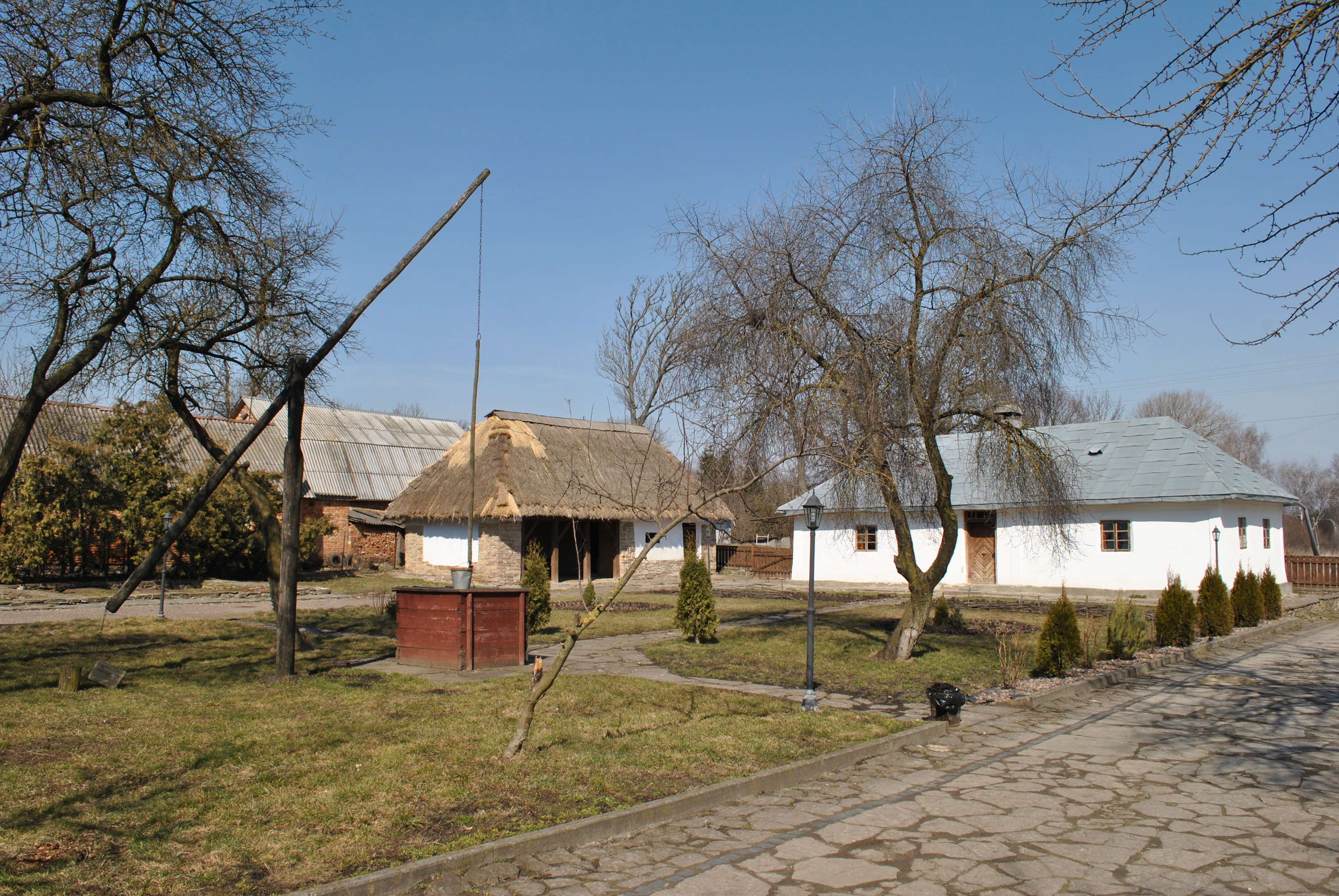 Музей-садиба Йосипа Сліпого в с. Заздрість Теребовлянського району Тернопільської області.